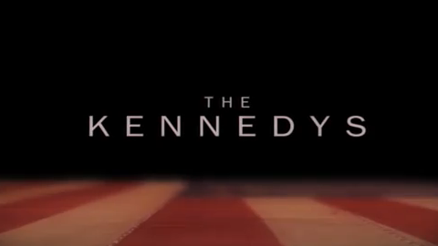 Logo de la minisérie THE KENNEDYS.